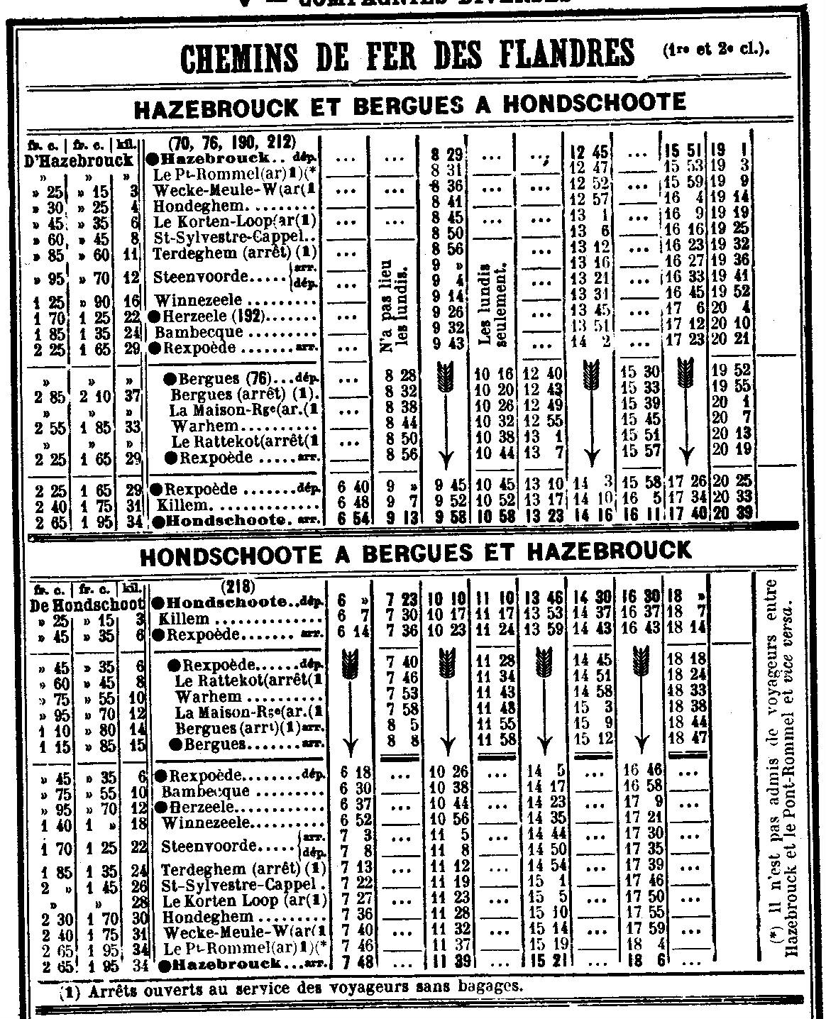 Extrait du livret Chaix de mai 1914 : Horaires de la Compagnie des chemins de fer des Flandres